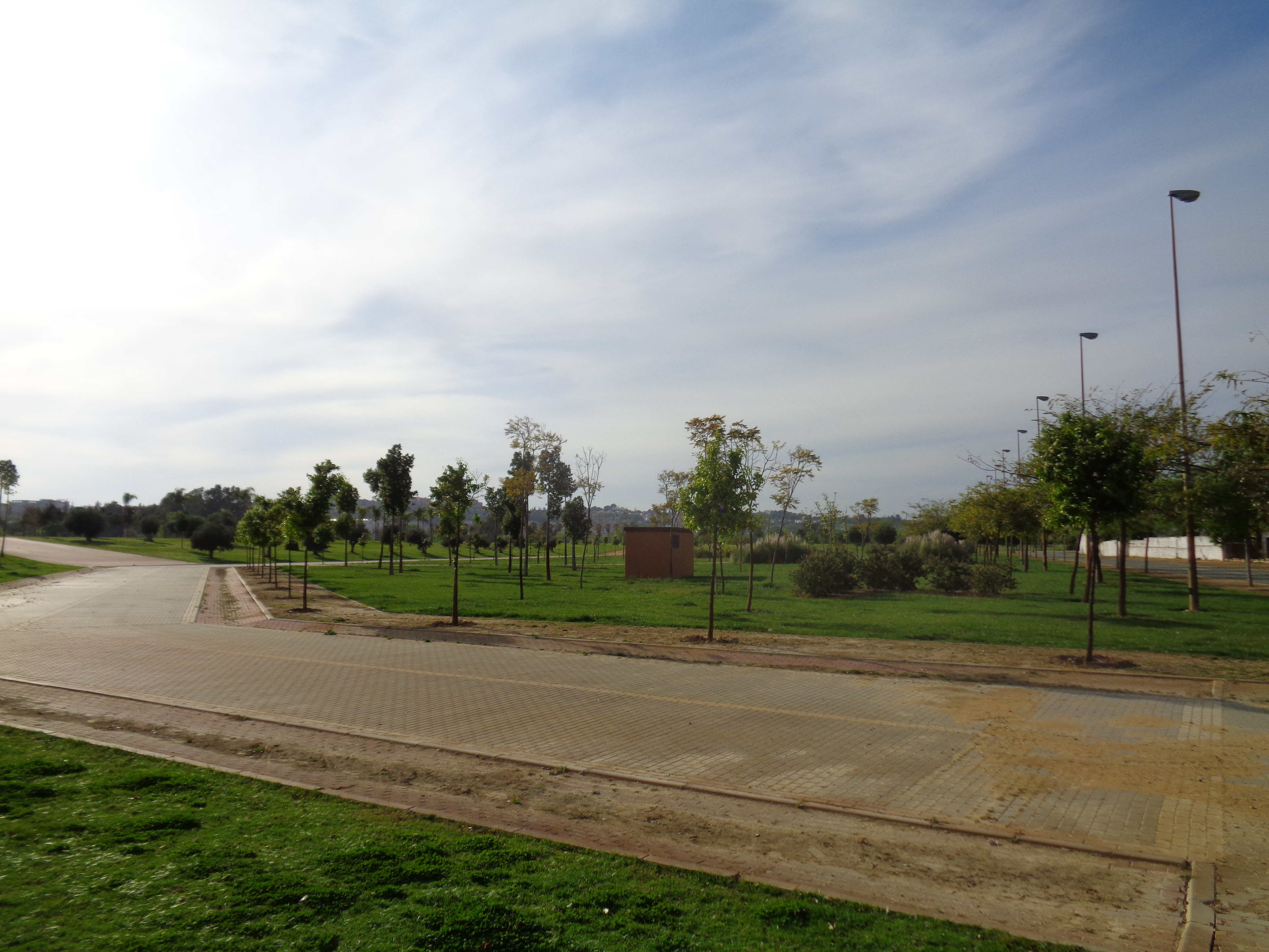 Parque de la Vega de Triana, también conocido como parque del Charco de la Pava. Sevilla.